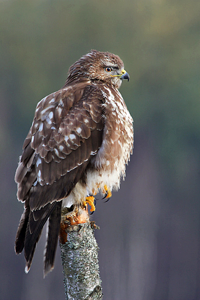 Buteo buteo